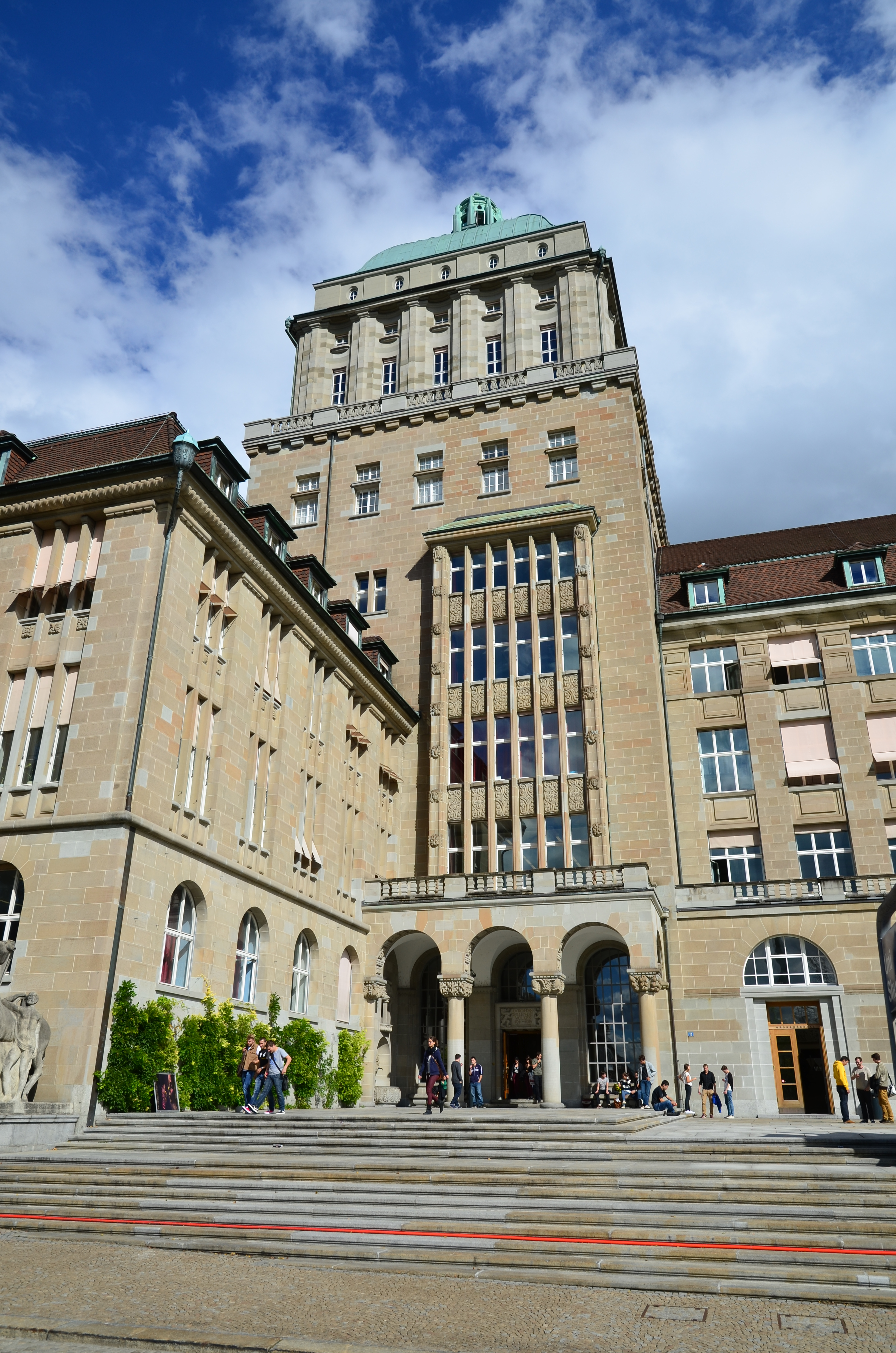 Hauptgebäude der Universität Zürich